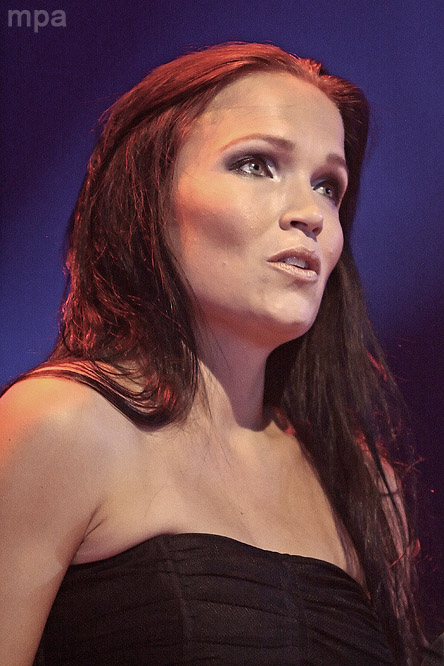 Tarja Turunen en la Sala Capitol (Santiago de Compostela) el 18-02-2012